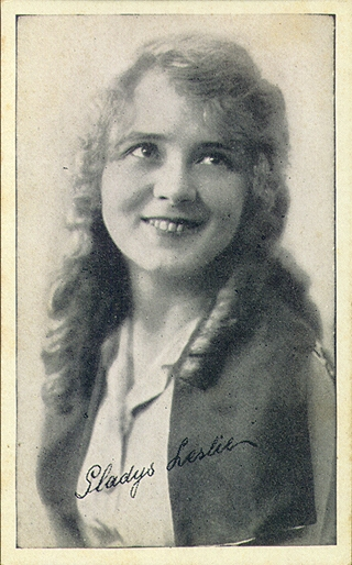 Gladys Leslie